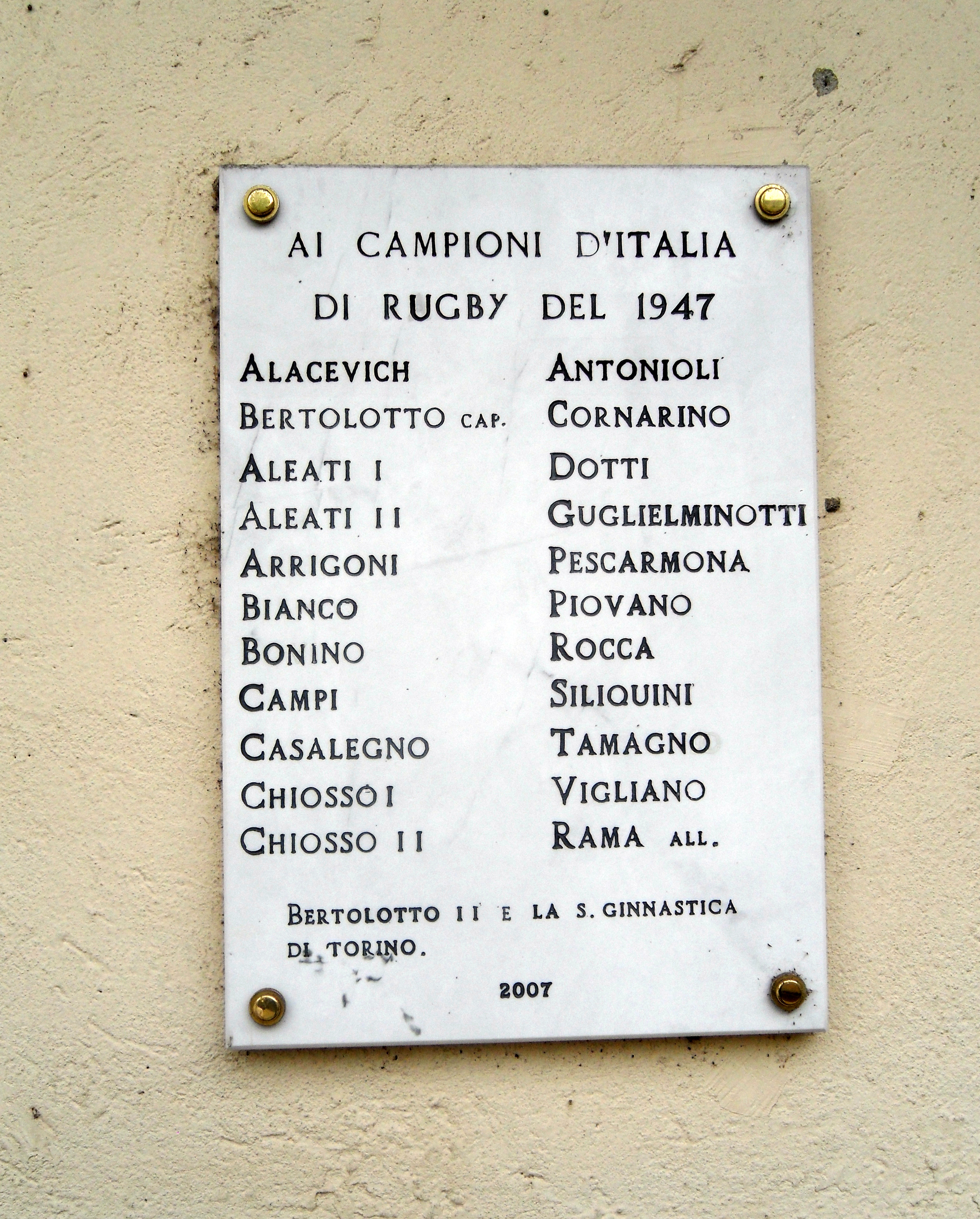 Plaque commémorative en l'honneur des champions de 1947 posée au Vélodrome Fausto Coppi de Turin